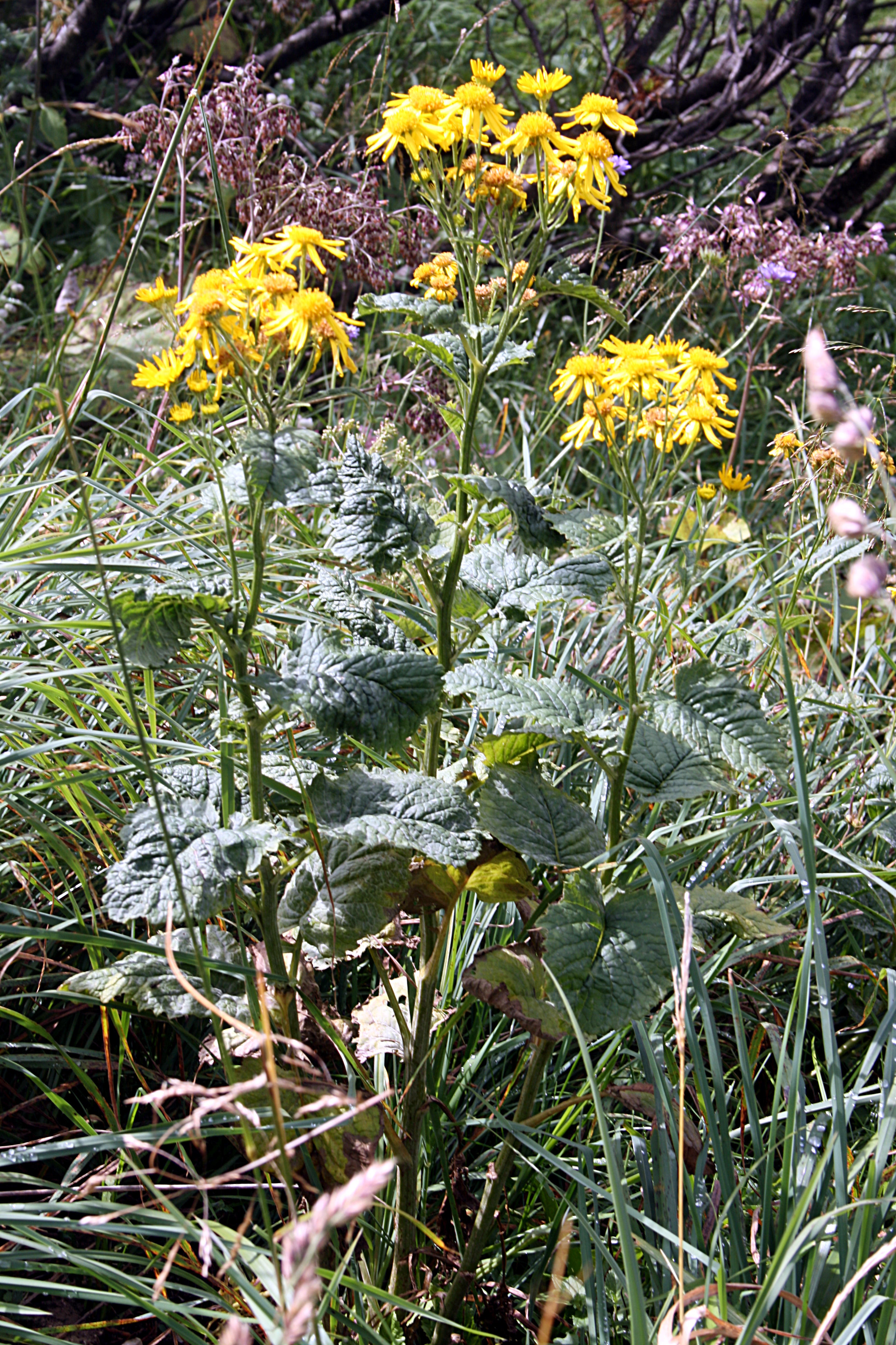 Alpen-Greiskraut (Senecio alpinus) auf dem Tegelberg